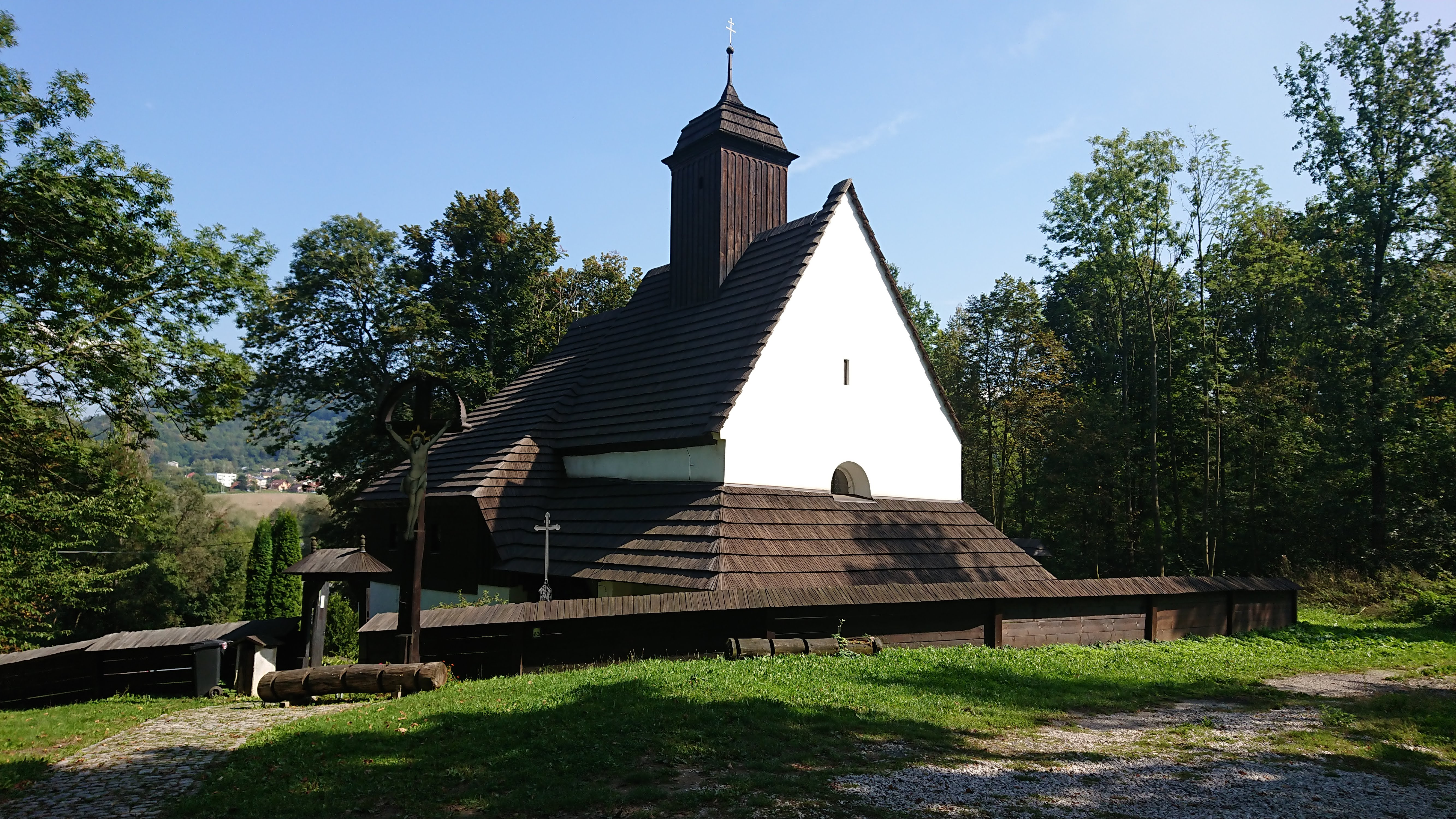 Tamovický kostel svaté Kateřiny u Štramberka. Pohled ze severozápadu.